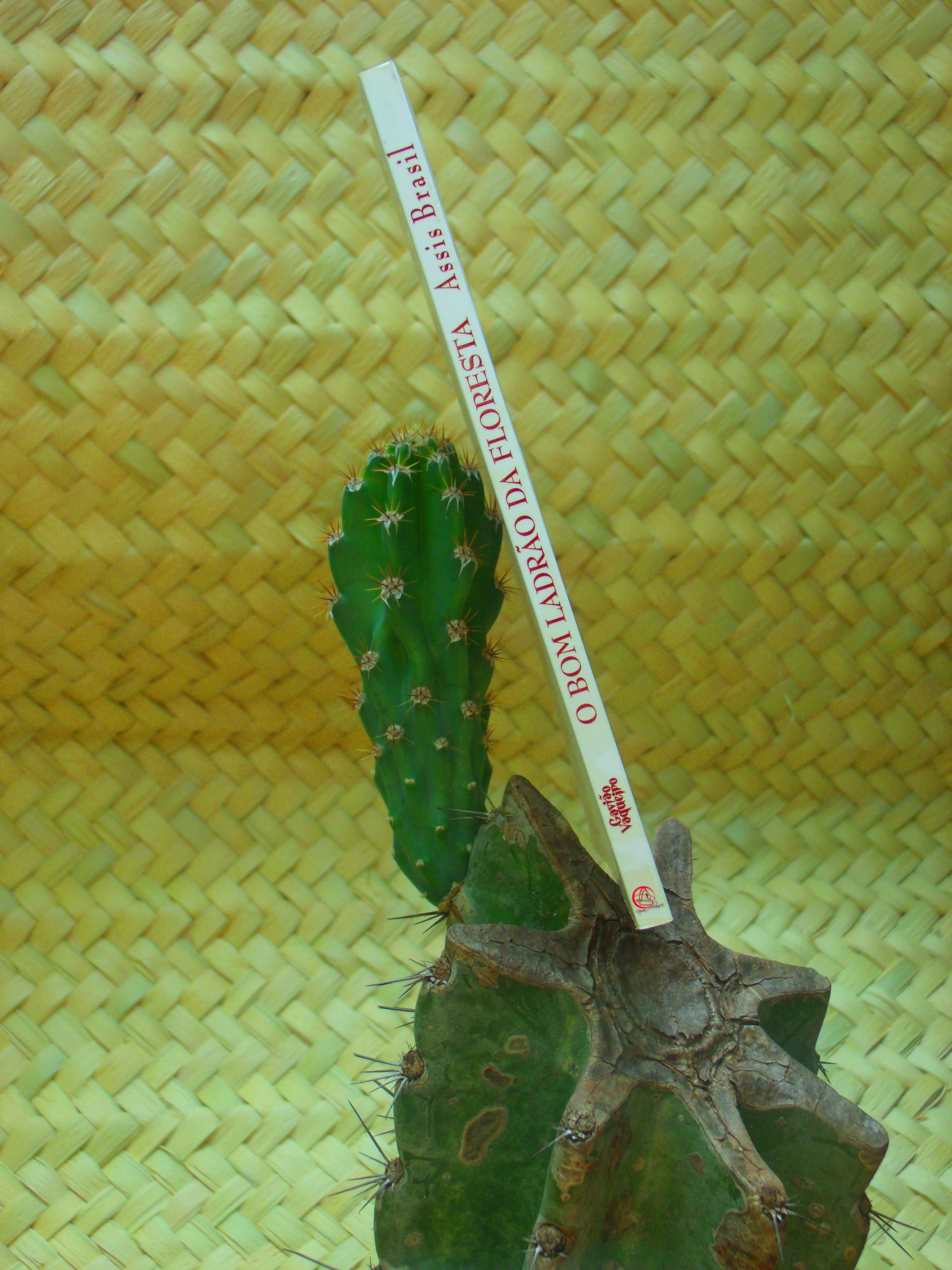 Cacto mandacaru como suporte aparador de livro em exposição da obra Gavião Vaqueiro - o bom ladrão da floresta do escritor Assis Brasil, que pertence a Academia Piauiense de Letras.